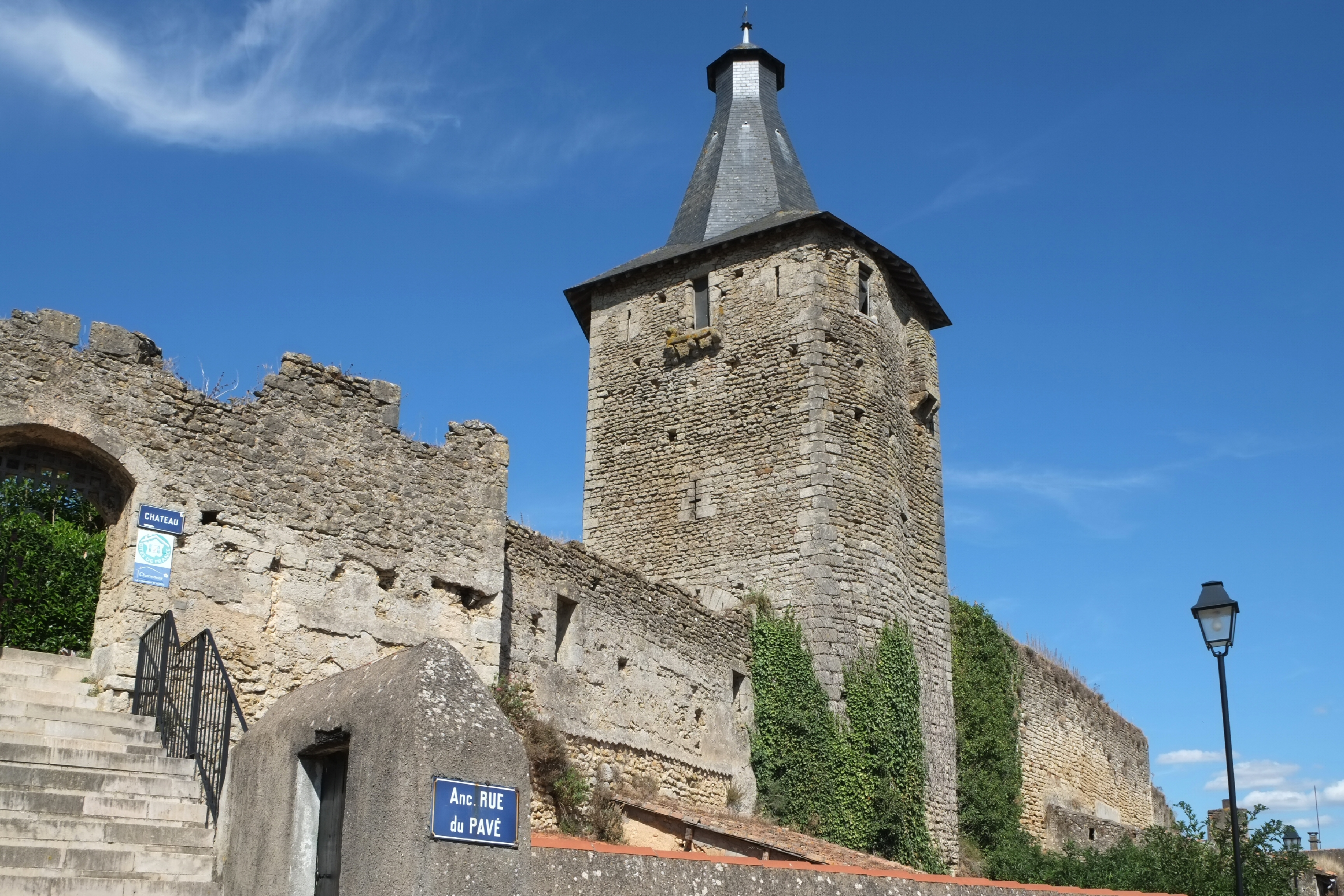 Tour-porte du château Airvault Deux-Sèvres France